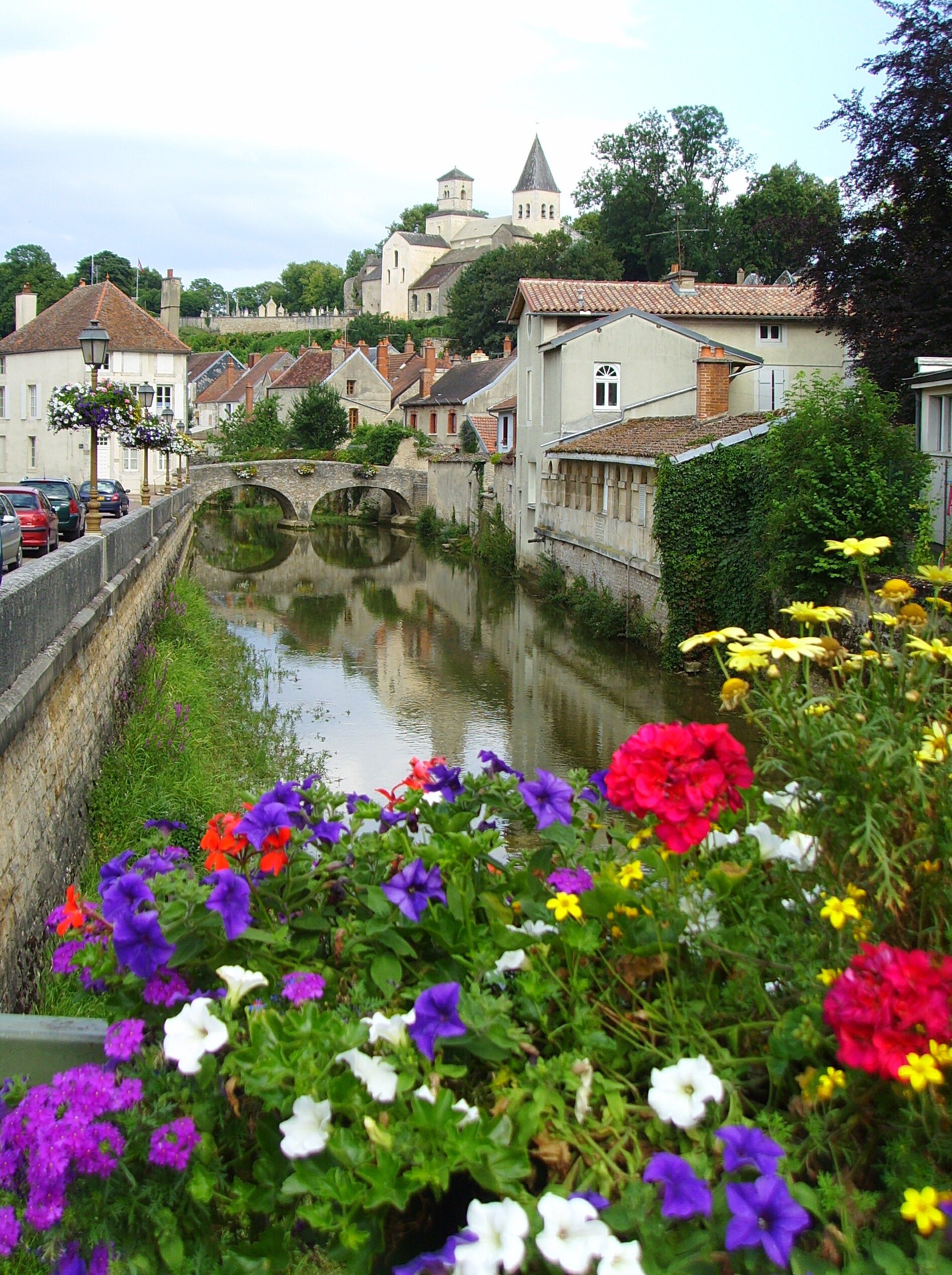 L'église Saint-Vorles depuis le centre ville